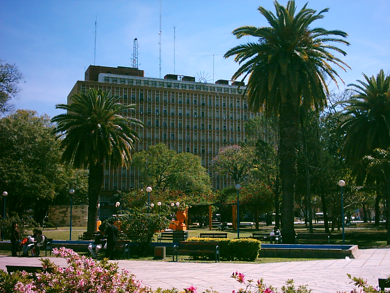 La Casa de Gobierno de la Provincia del Chaco, vista desde la Plaza 25 de Mayo.